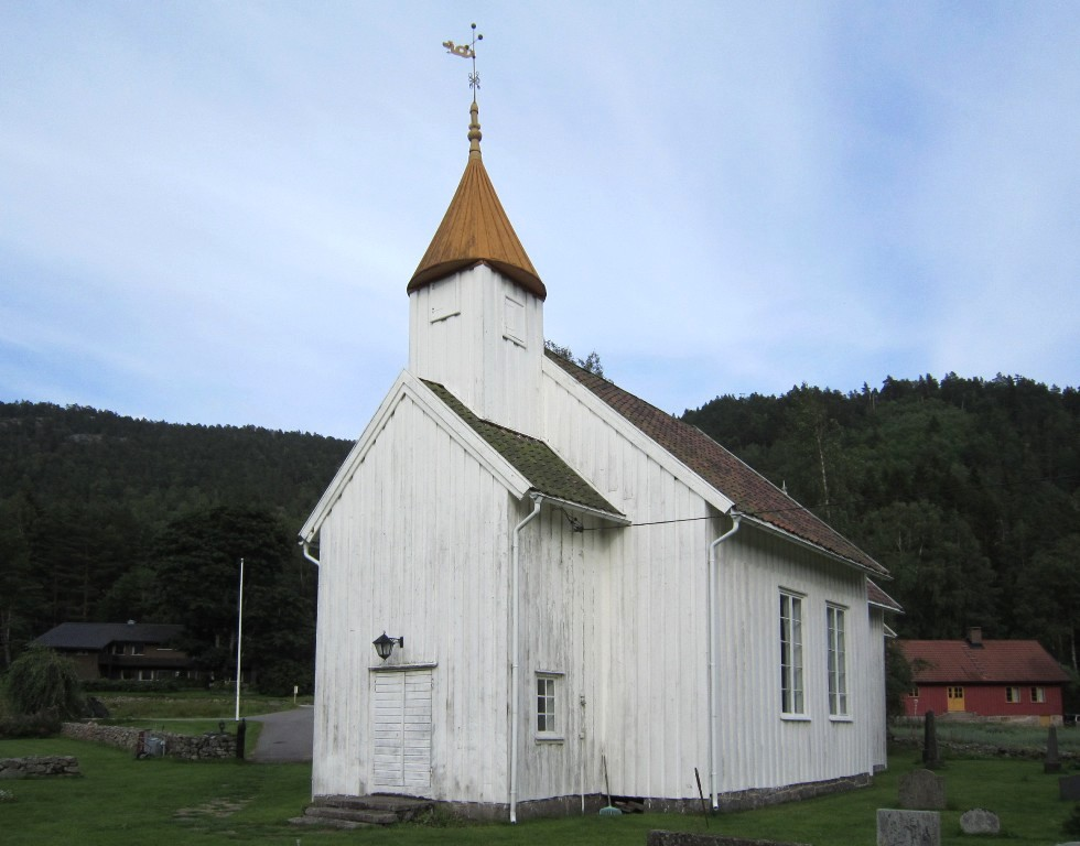 Tovdal kirke (Åmli kommune, Aust-Agder)